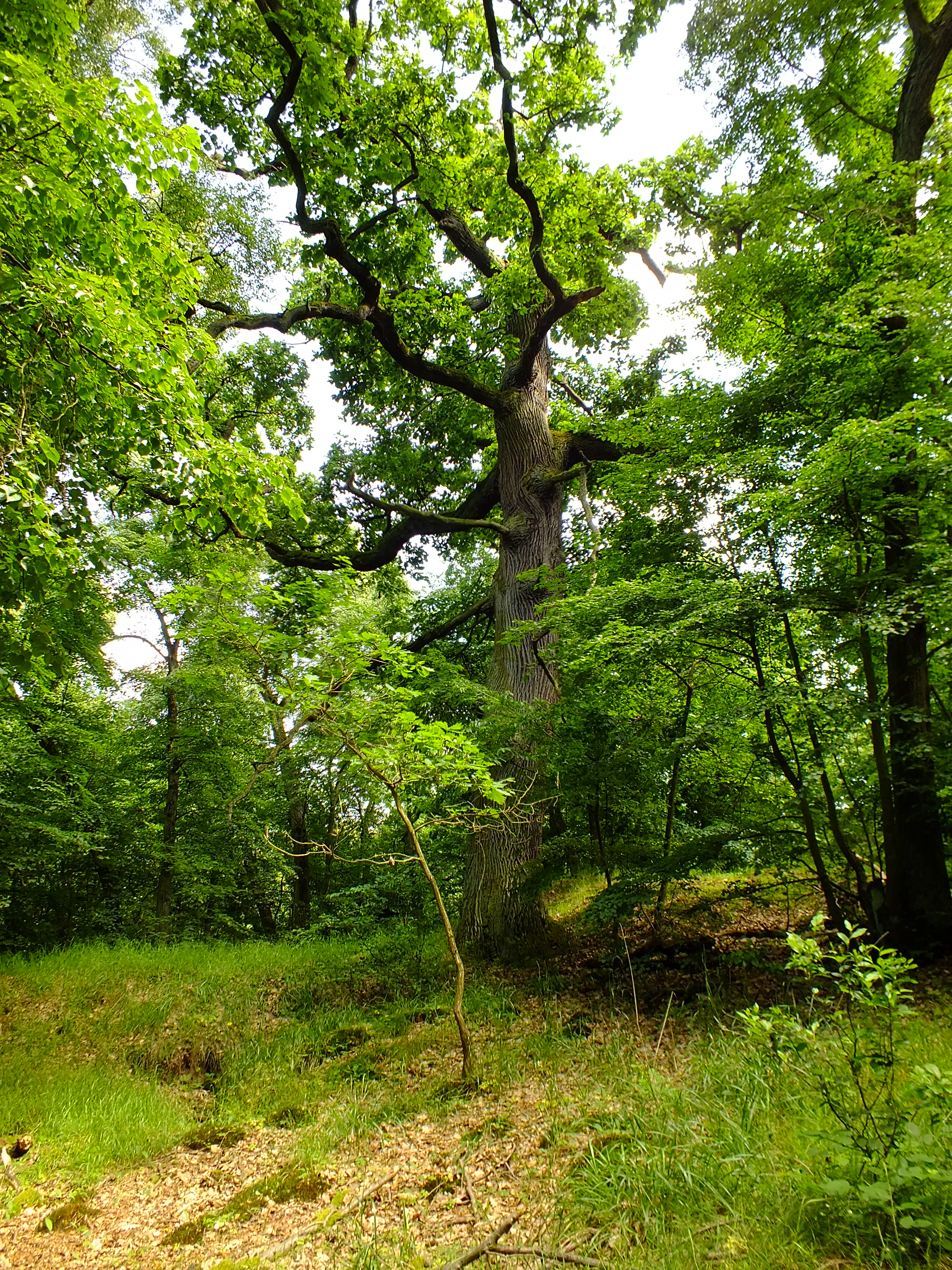 Alte Eiche im Naturschutzgebiet "Colbitzer Lindenwald" NSG0014. Der Colbitzer Lindenwald hat eine reiche Avifauna. Besonders bemerkenswert ist die Baumbrüterpopulation der Mauersegler (Apus apus).